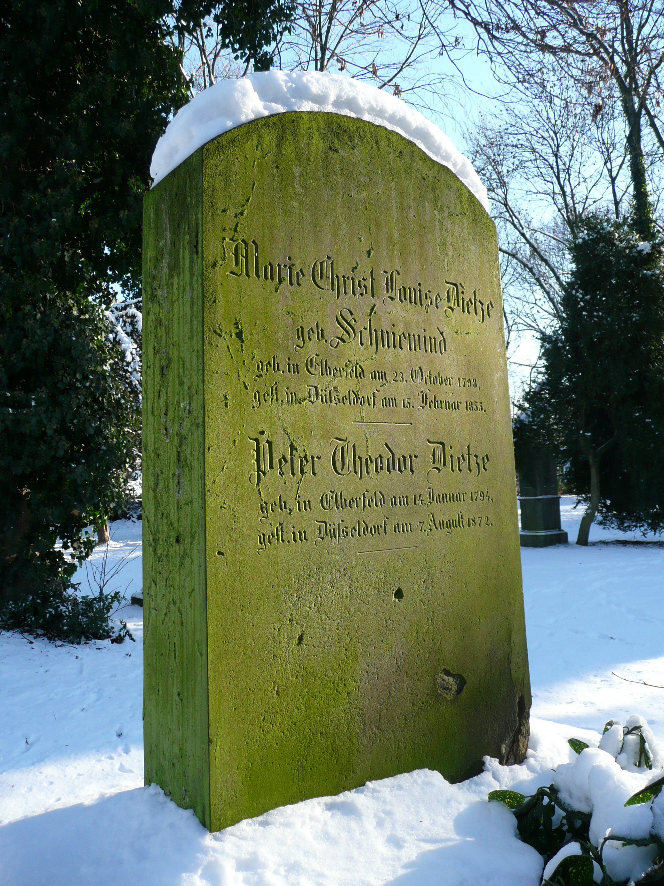 Grab der Eheleute Dietze auf dem Golzheimer Friedhof in Düsseldorf)